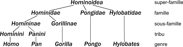 Classification des Hominidae (7). Certains auteurs distinguent la famille des Pongidae pour les orangs-outans et divisent la famille des Hominidae en une sous-famille des gorillinés comprenant les gorilles et une sous-famille des homininés comprenant les chimpanzés et les hommes.